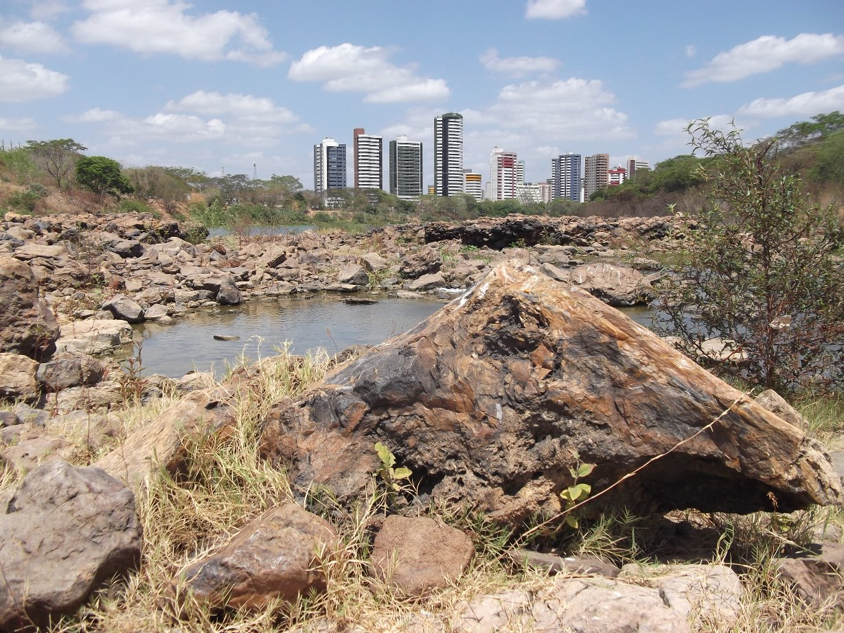 Tronco de gimnosperma, Floresta Fóssil do Rio Poti, em Teresina.